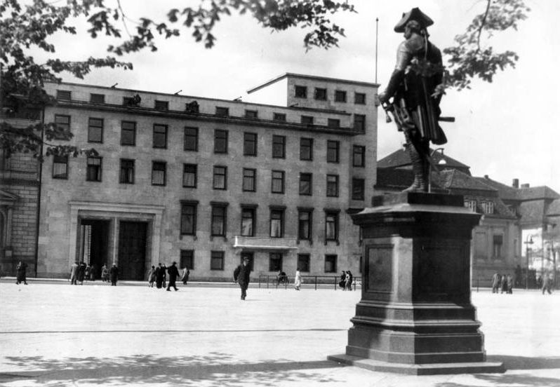 Reichsbahnzentrale für den Deutschen Reiseverkehr, Reichshauptstadt Berlin, Reichskanzlei Bildberichterstatter RDP. Kurt Breuer, Bln-Zehlendorf, Argentinische Allee 197, Foto erworben: 13.5.39